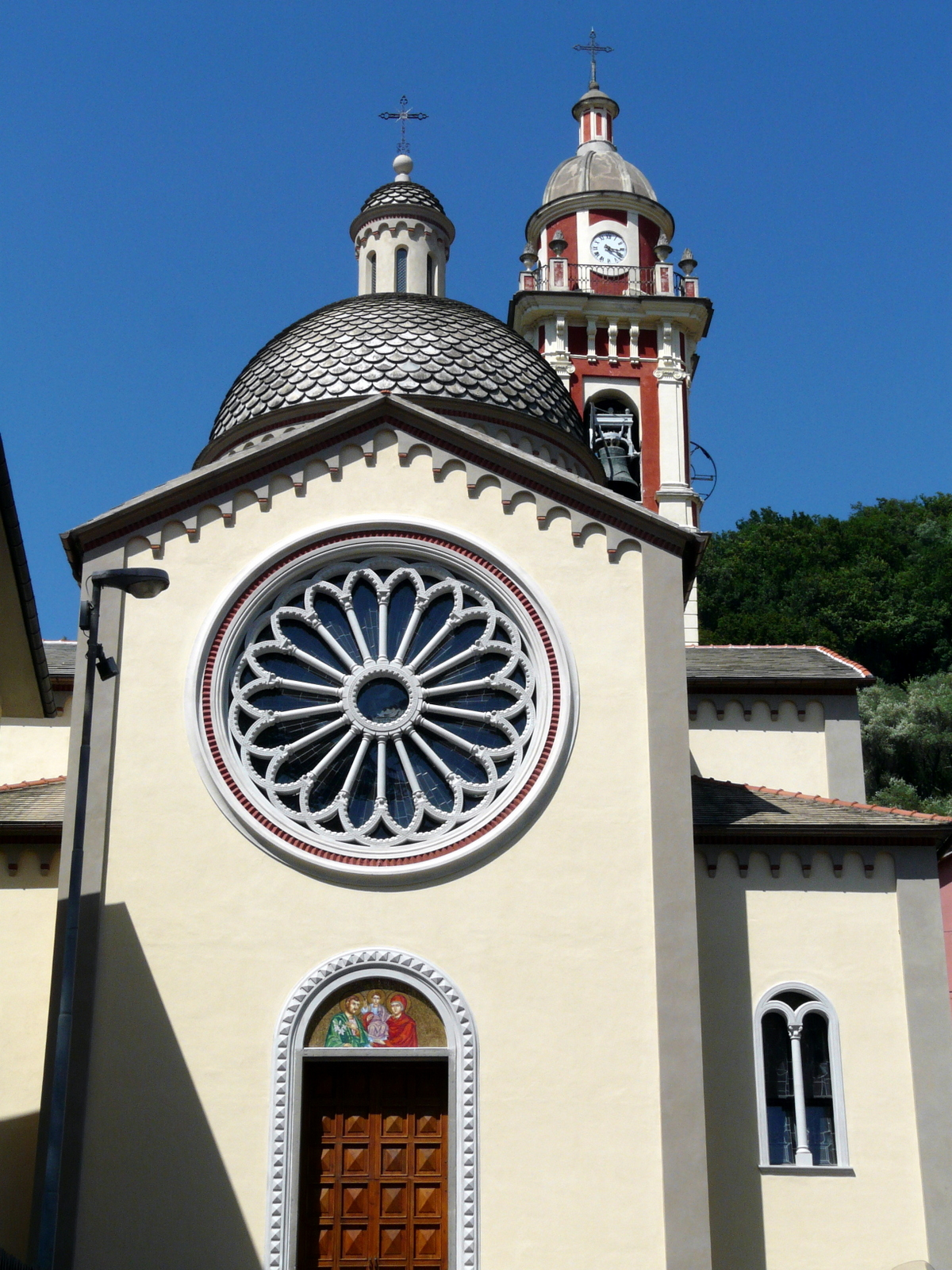 La chiesa di San Marziano, Carasco, Liguria, Italia